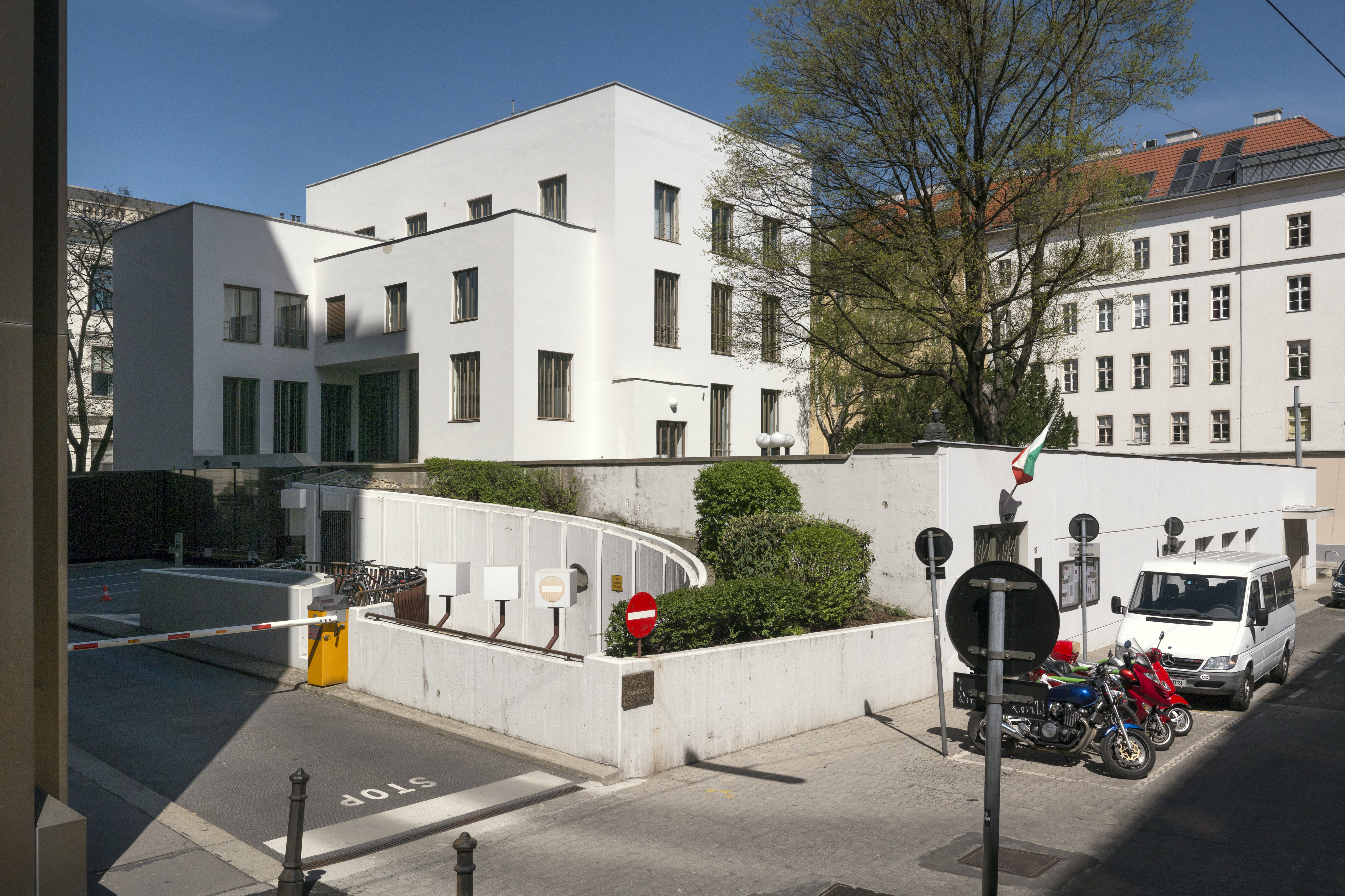 Wohnhaus, Haus Stonborough-Wittgenstein